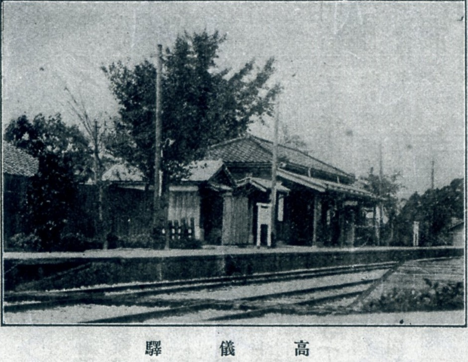 中越線高儀駅